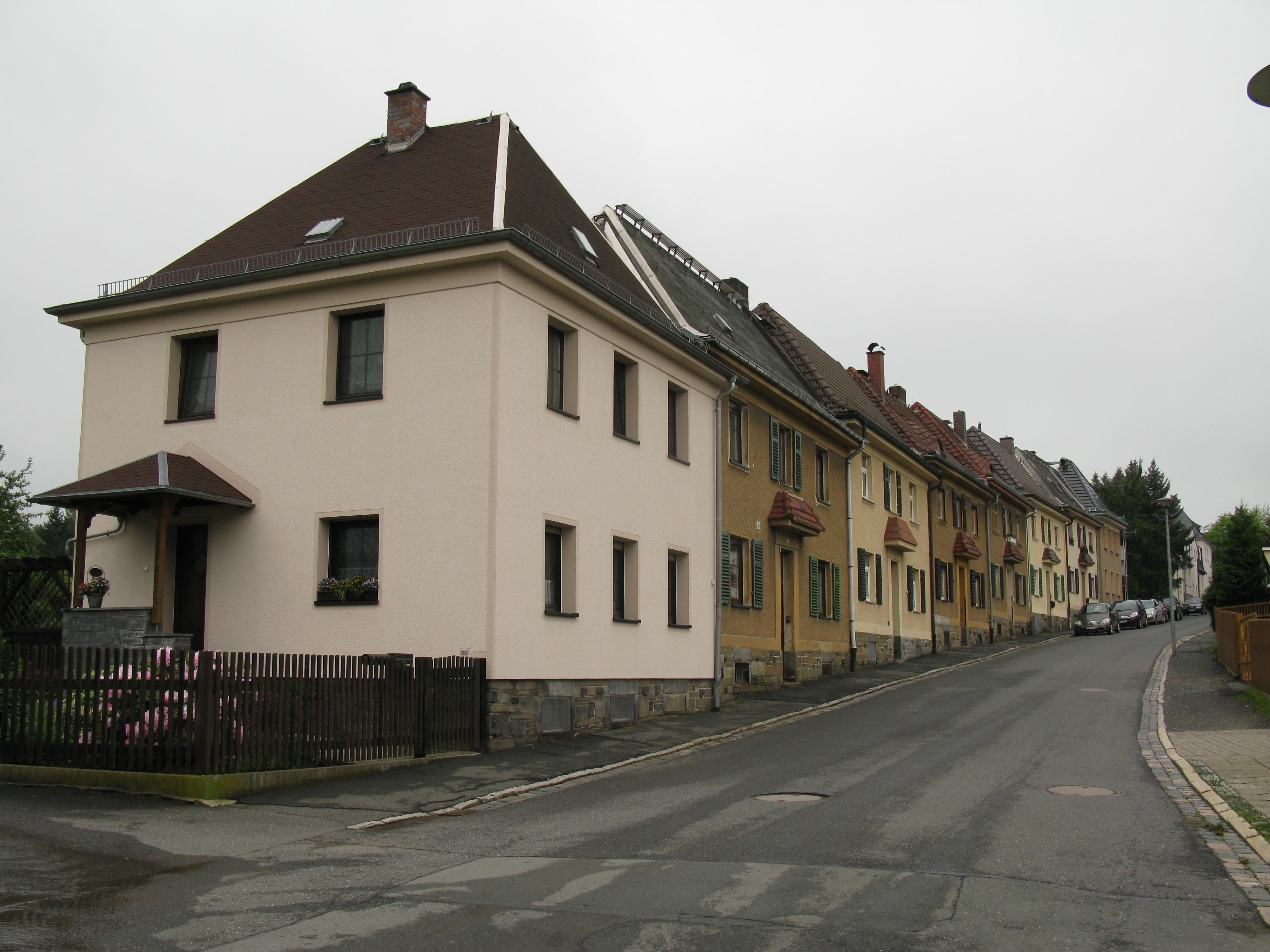 Plauen, denkmalgeschützte Häuser in der Vettersstraße(Vettersstraße 9, 11, 13, 15, 17, 19, 21 und 23). Die Häuser gehören zur "Sachgesamtheit Vettersstraße"